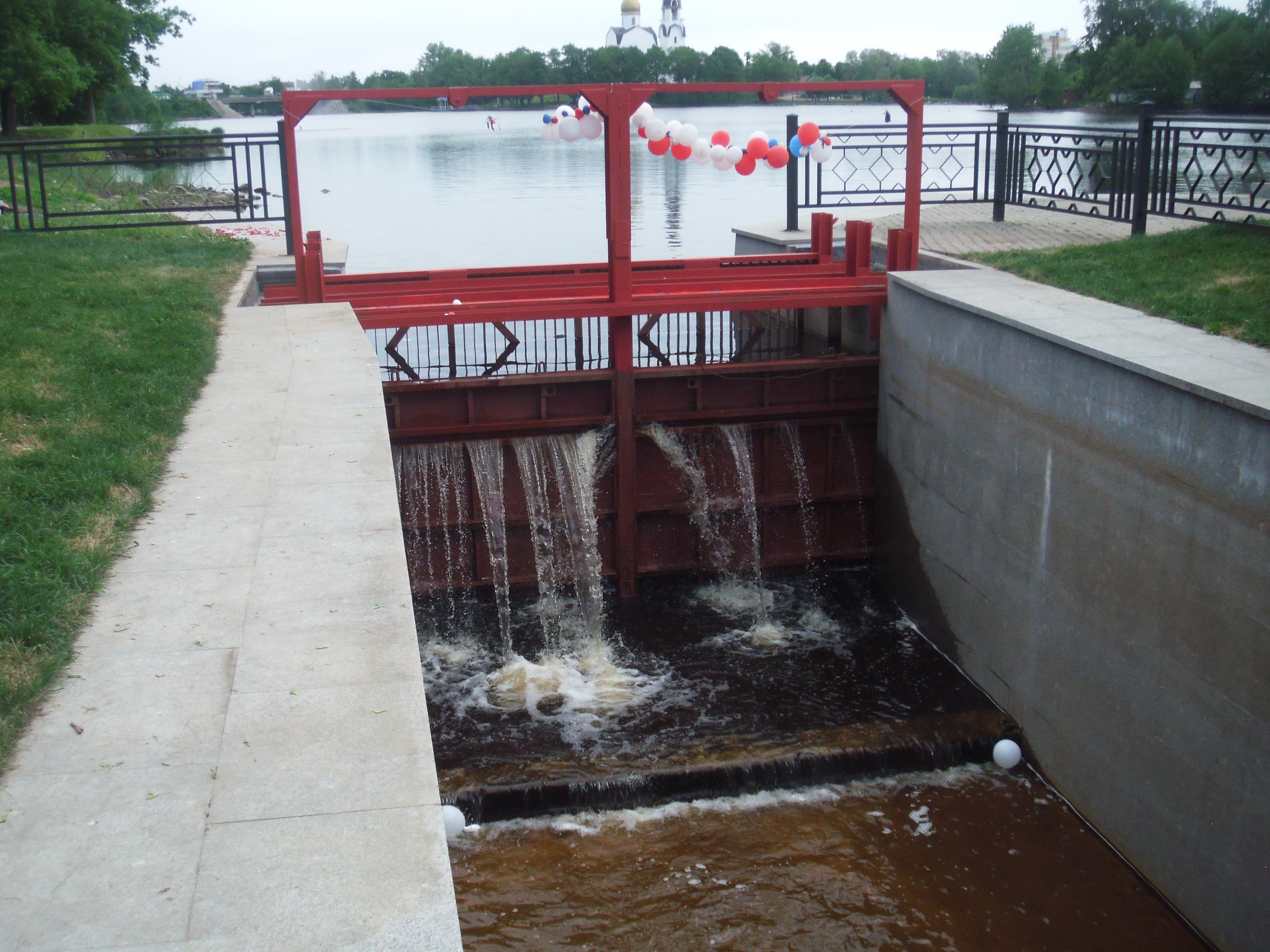 Сестрорецк СПб. Плотина заводской ГЭС после реконструкции 2013 года.